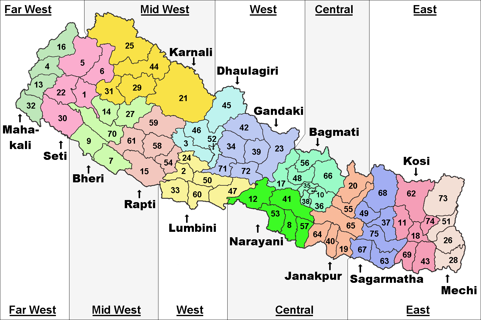 FrenchCarte des subdivisions du Népal (wp-FR) : 5 régions de développement, 14 zones et 75 districts. Noms des régions en anglais. EnglishMap of subdivisions of Nepal: 5 development regions, 14 zones and 75 districts. Regions names in English.